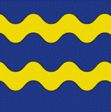 Flag of Goldach, Canton of St. Gallen - Flago de Goldach, Kantono de Sankt-Galo